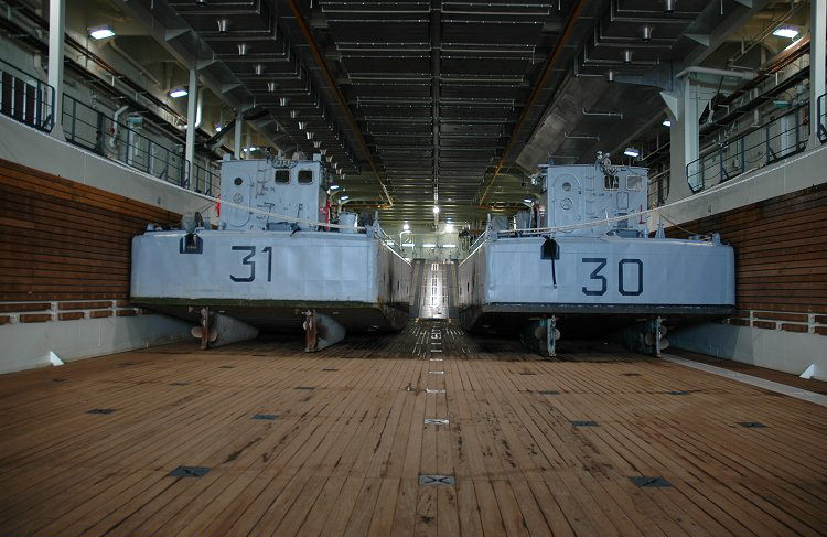 A l'occasion de sa traversée de longue durée, le BPC Mistral embarque deux Chalands de Transport de Matériel (CTM) de la flottille amphibie de Toulon (avril 2006).